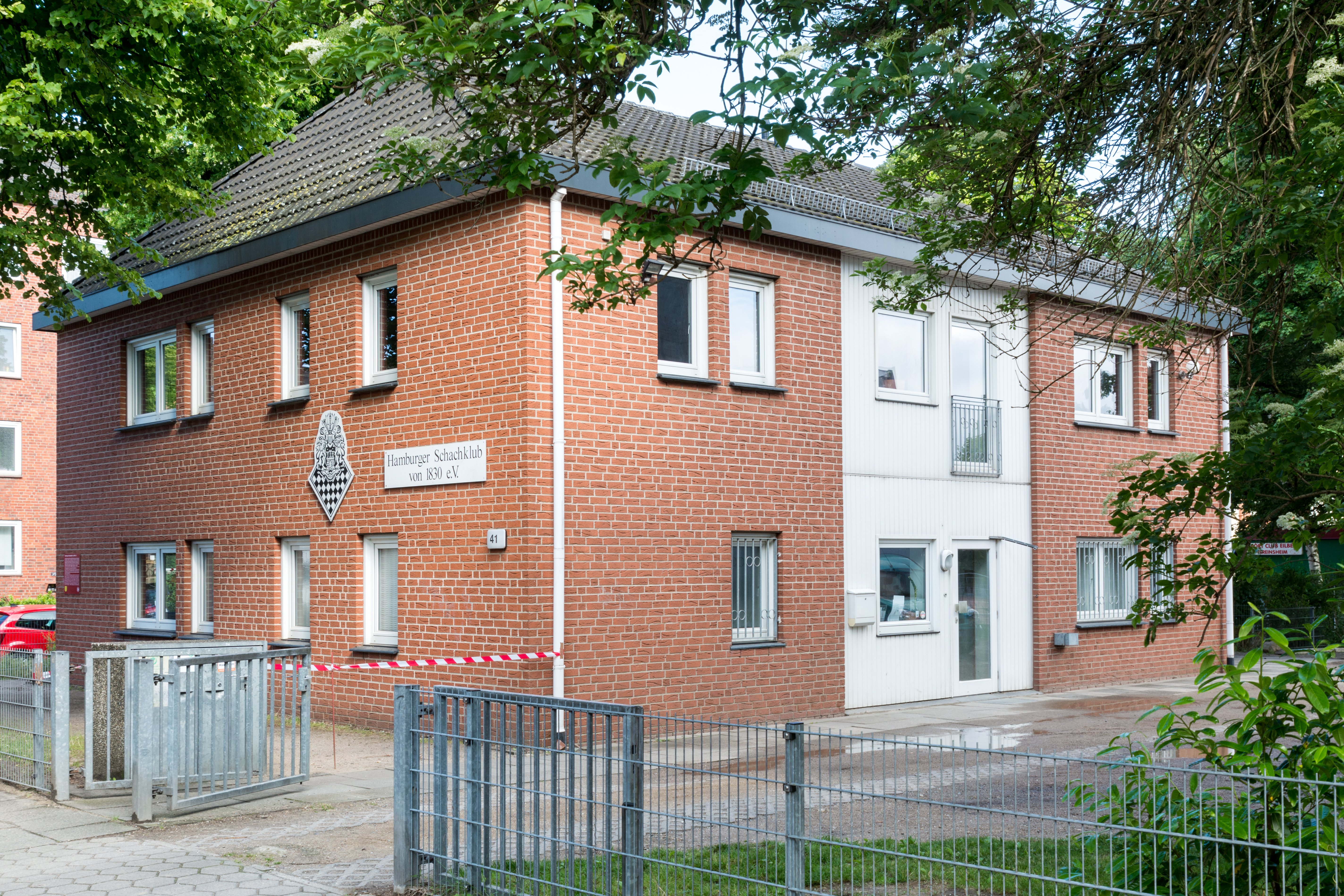 HSK Schachzentrum, Schellingstraße 41 in Hamburg Eilbek.